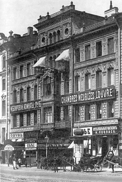 Фотография доходного дома Н. И. Дернова